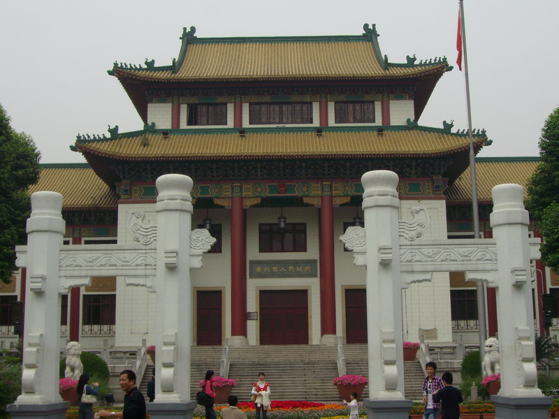 广州市人民政府位于府前路的正门